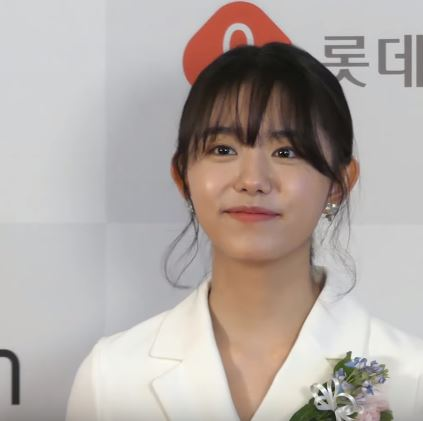 17일 오후 서울시 영등포구 여의도 콘래드 서울에서 '2019 브랜드 고객충성도 대상' 시상식이 열려 연기돌 부문 수상자 김소혜가 참석해 포토타임에 포즈를 취하고 있다.